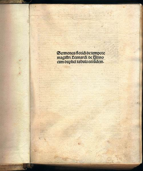 Leonardus de Utino „Sermones floridi de tempore" című műve 1503-as leydeni kiadásának címlapja